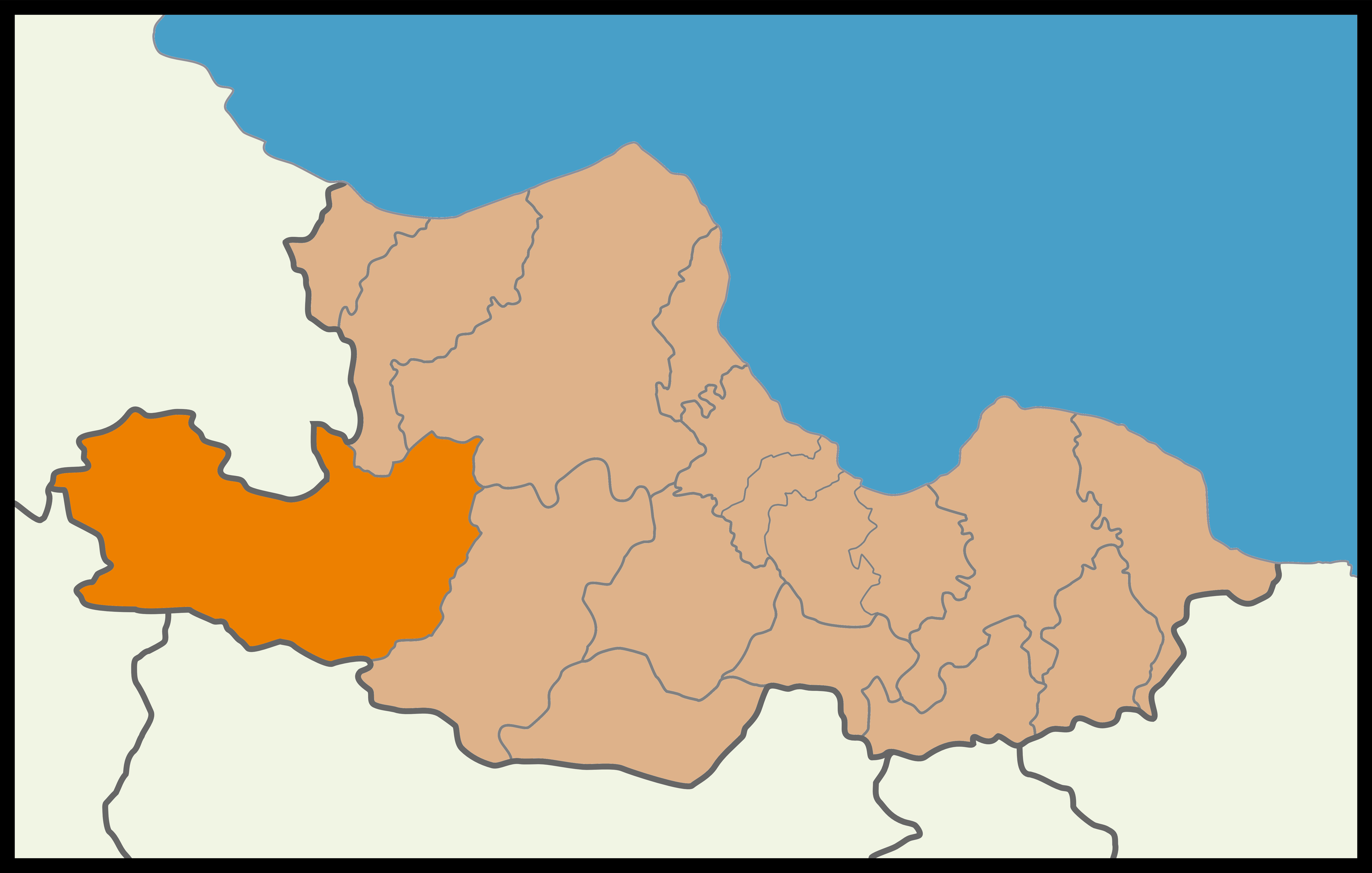 Samsun'un Vezirköprü ilçesinin 2015 Türkiye genel seçimleri haritası.